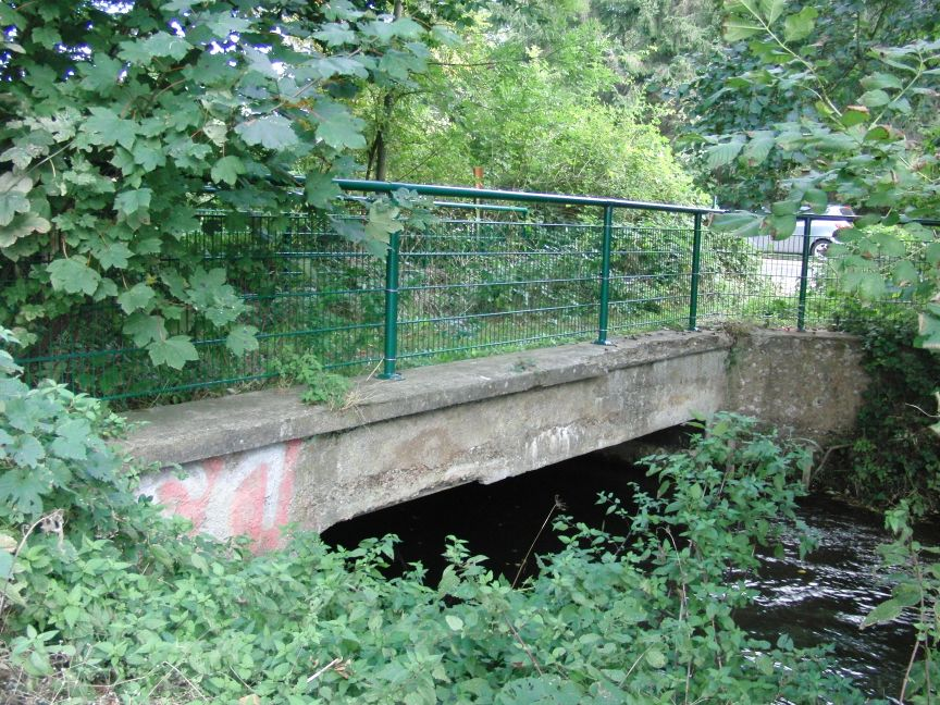 Brücke der ehemaligen DKB-Ringbahn über den Mühlenteich westlich des Bahnhofs Mariaweiler